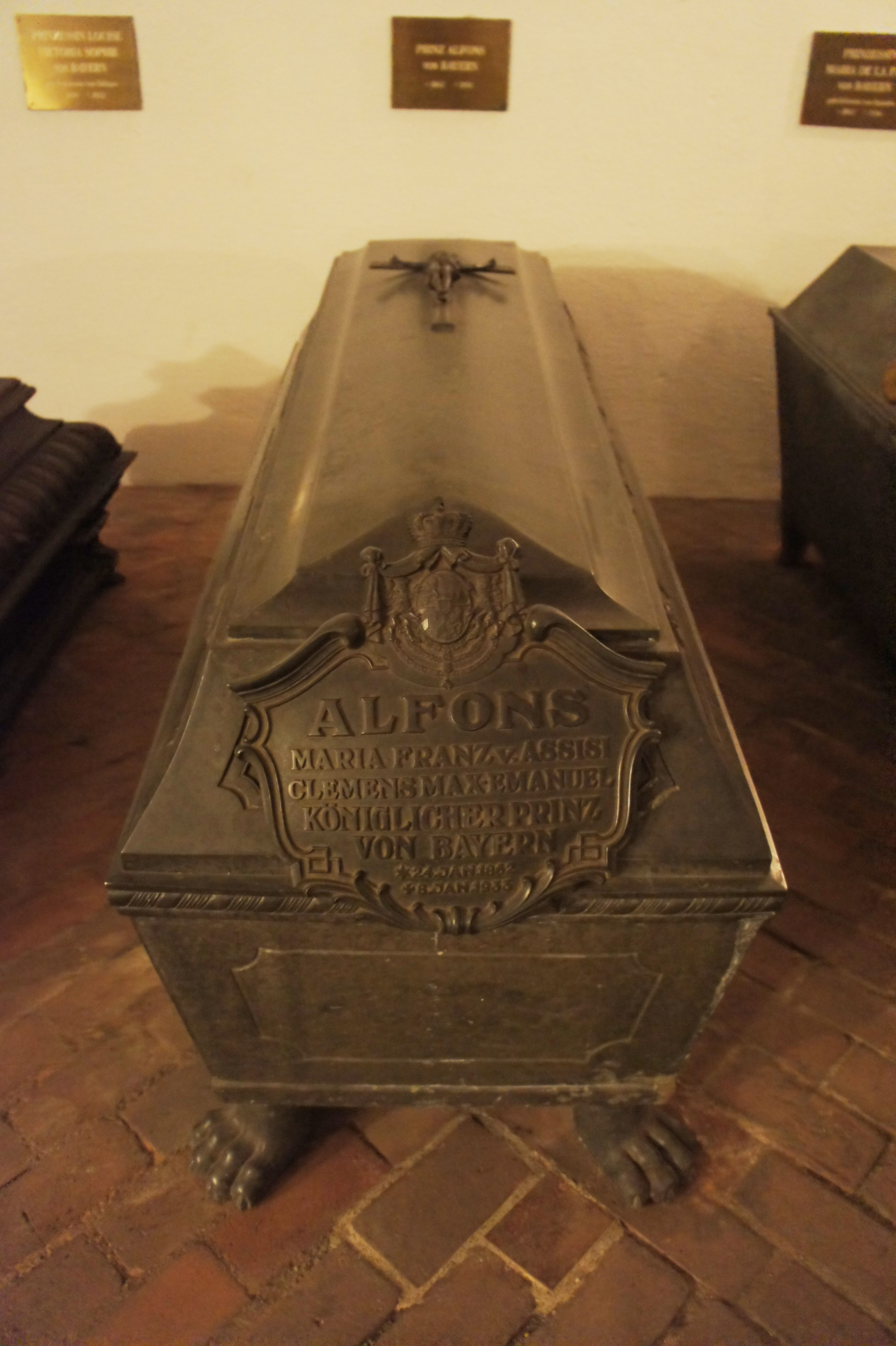 Prinz Alfons (24. Januar 1862 – 8. Januar 1933) (Sohn von Prinz Adalbert Wilhelm). Sarkophag in der Grablege der Wittelsbacher in der St. Michael Kirche in München.